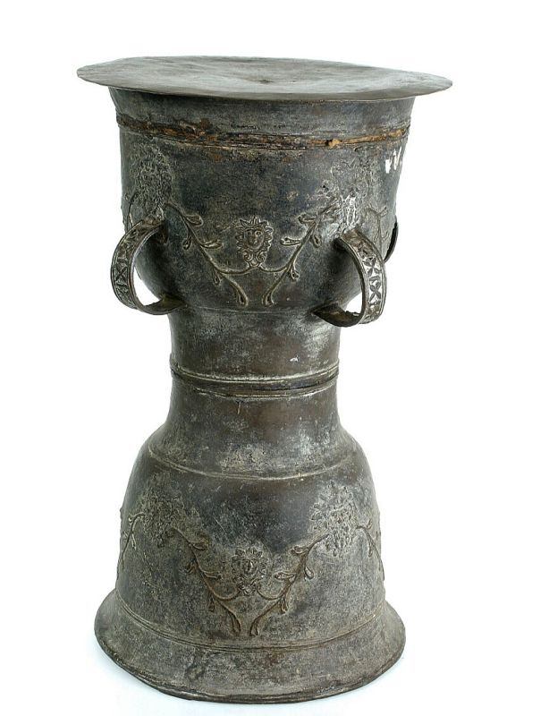 Ruilmiddel. Zandlopervormige trom met 4 uitstekende oren en ingegraveerde mensenkoppen Unknown language: moko